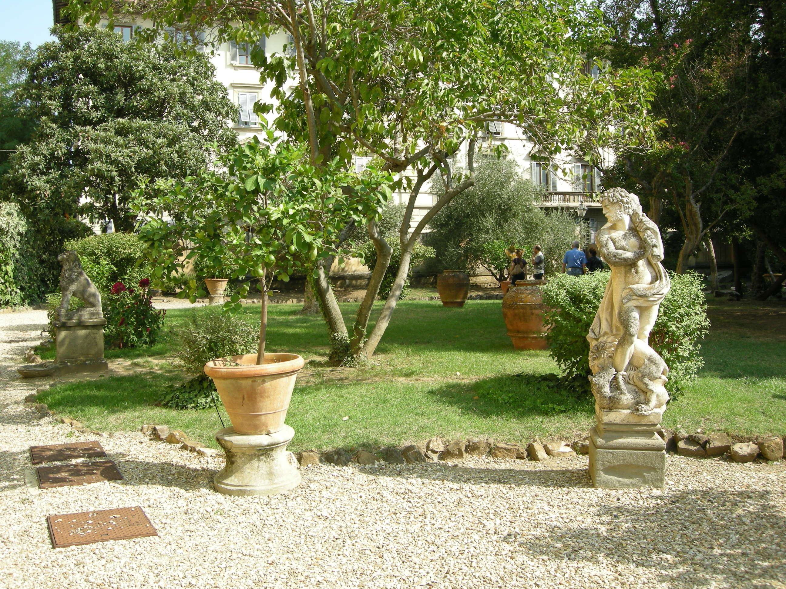 Palazzo ximenes panciatichi da sangallo, giardino